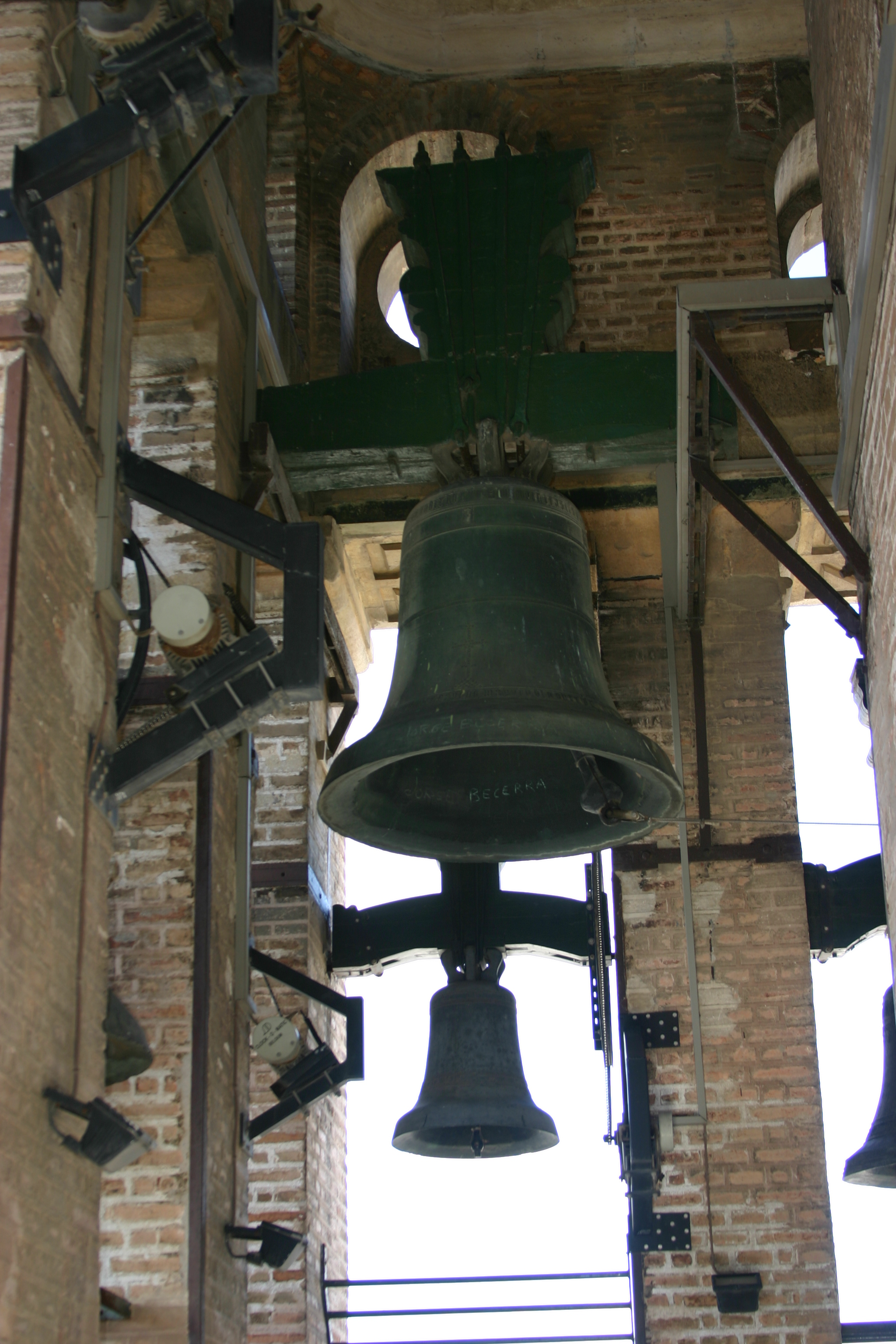 Sino na Catedral de Sevillha